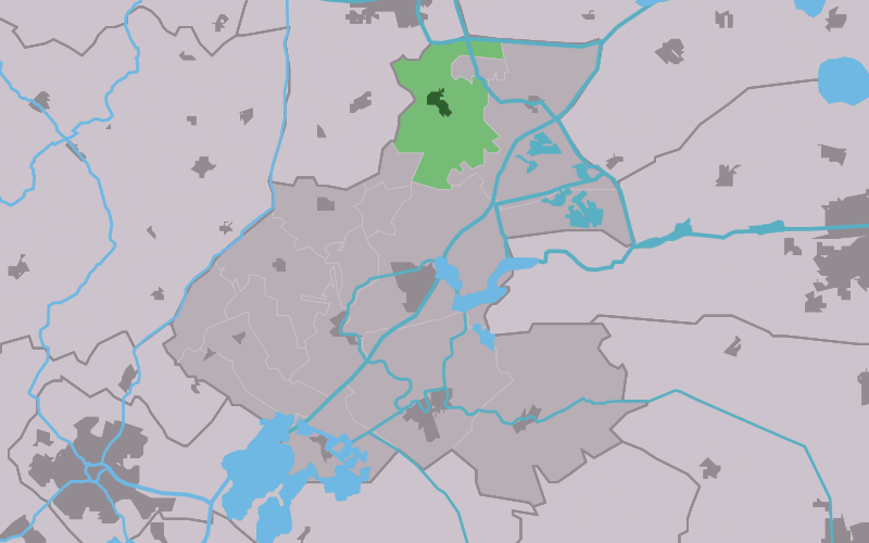 Kaartsje fan himrik fan Wergea